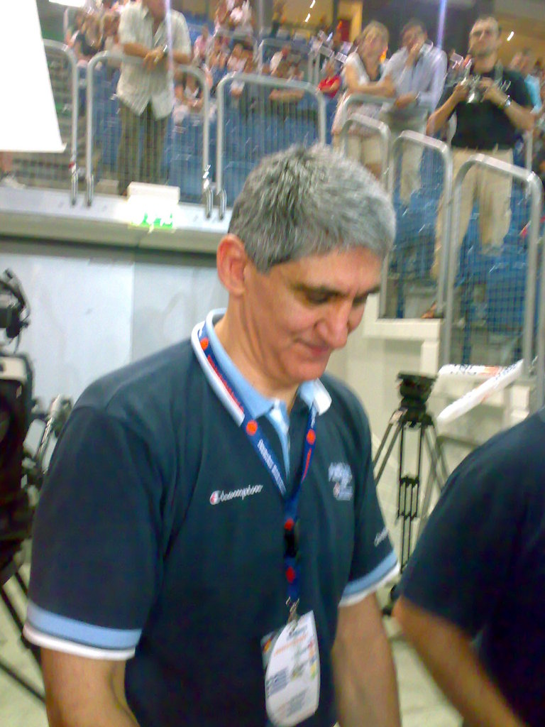 Panagiotis Giannakis, Trainer der griechischen Basketballnationalmannschaft